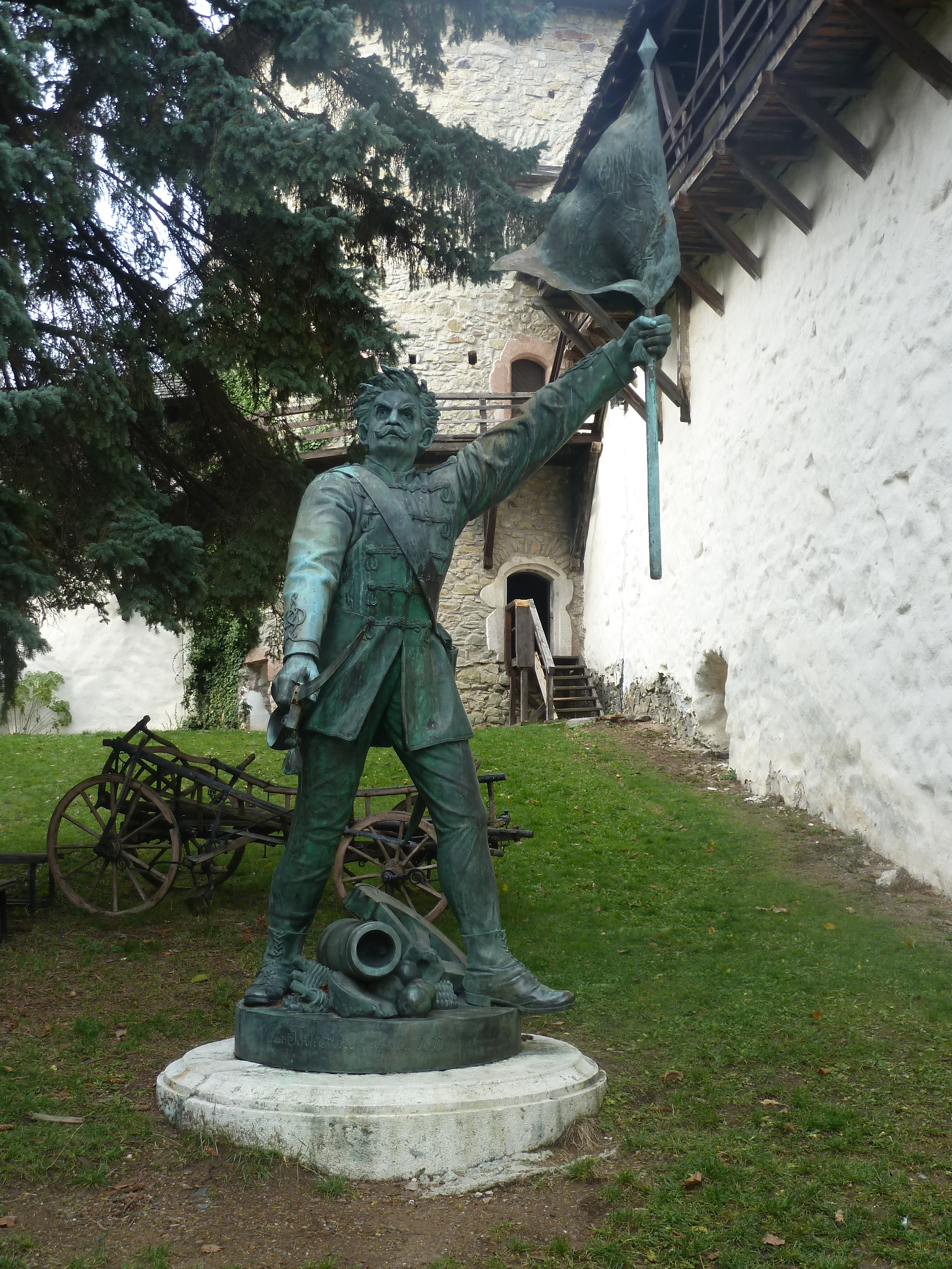 A selmecbányai Honvéd-szobor, Tóth Árpád költő édesapjának (Andrásnak) az alkotása, restaurálva áll az óvári várudvaron.